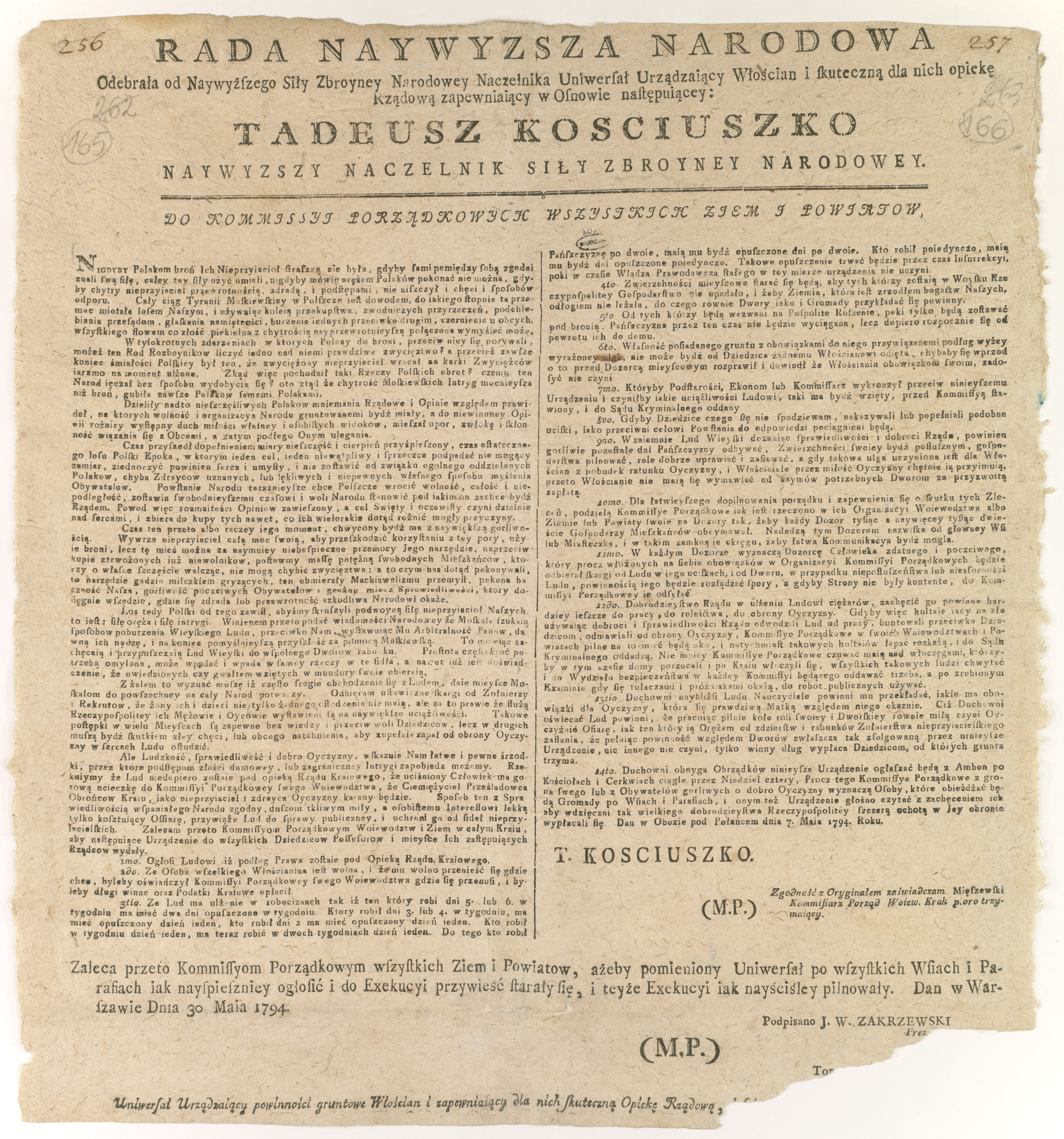 Uniwersał Tadeusza Kościuszki, Najwyższego Naczelnika Siły Zbrojnej Narodowej, zapewniający chłopom opiekę rządową, wolność osobistą (możliwość opuszczenia wsi po wypełnieniu zobowiązań), nieusuwalność z ziemi o ile wypełnili świadczenia na rzecz dworu, zmniejszenie pańszczyzny, a chłopom będącym w wojsku powstańczym jej zawieszenie na okres powstania. Polecano organizować dozory, mające nadzorować wprowadzenie uniwersału w życie. Uniwersał został ogłoszony 7 V 1794 r. w obozie pod Połańcem, druk pochodzi z 30 V tego roku z Warszawy.